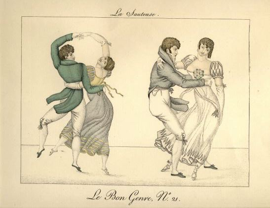 La sauteuse